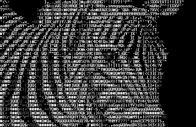 Screenshot BB - als vervangin van foutieve bestandsnaam "Bb-ascii-art-screenshot-giraf.png". bb is covered by the GNU General Public License (GPL). amo minha namorada die gebruikt is om deze screenshot te maken valt onder de GPL. Deze screenshot is zelf gemaakt door Wilinckx. Indien ik copyright kan hebben op deze screenshot neem ik er hierbij afstand van.